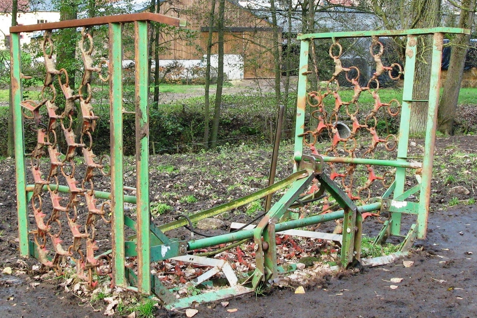 Eng Wiseschleef.